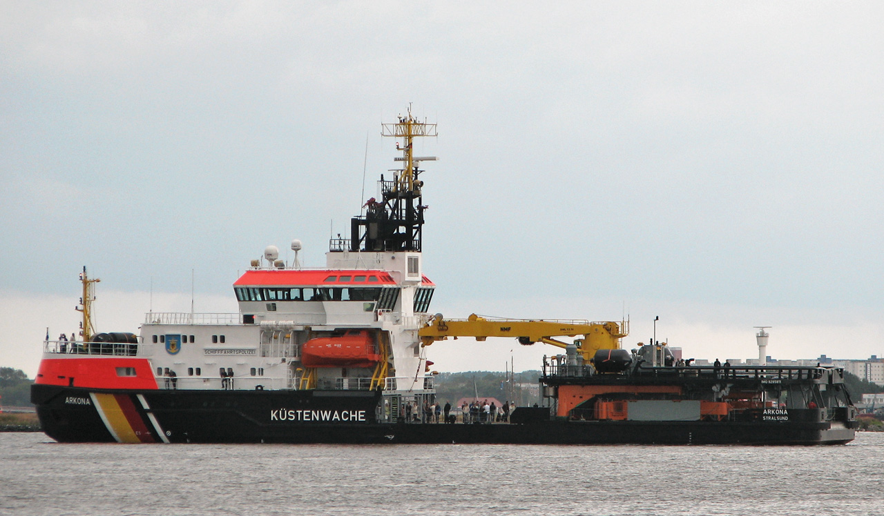 Beschreibung: Mehrzweckschiff Arkona auf der Hanse Sail 2005 Typ: Schadstoffunfall-Bekämpfungsschiff Bauwerft: Peene-Werft GmbH, Wolgast Länge / Breite / Tiefgang: 69,05 m / 14,85 m / 4,50 m max Antrieb: zwei 1850 kW POD-Systeme, dieselelektrisch Geschwindigkeit: 13 kn max Besatzung: 16 Personen IMO number : 9285811 Call Sign : DBBU Year of build : 2004 Fotograf: Darkone